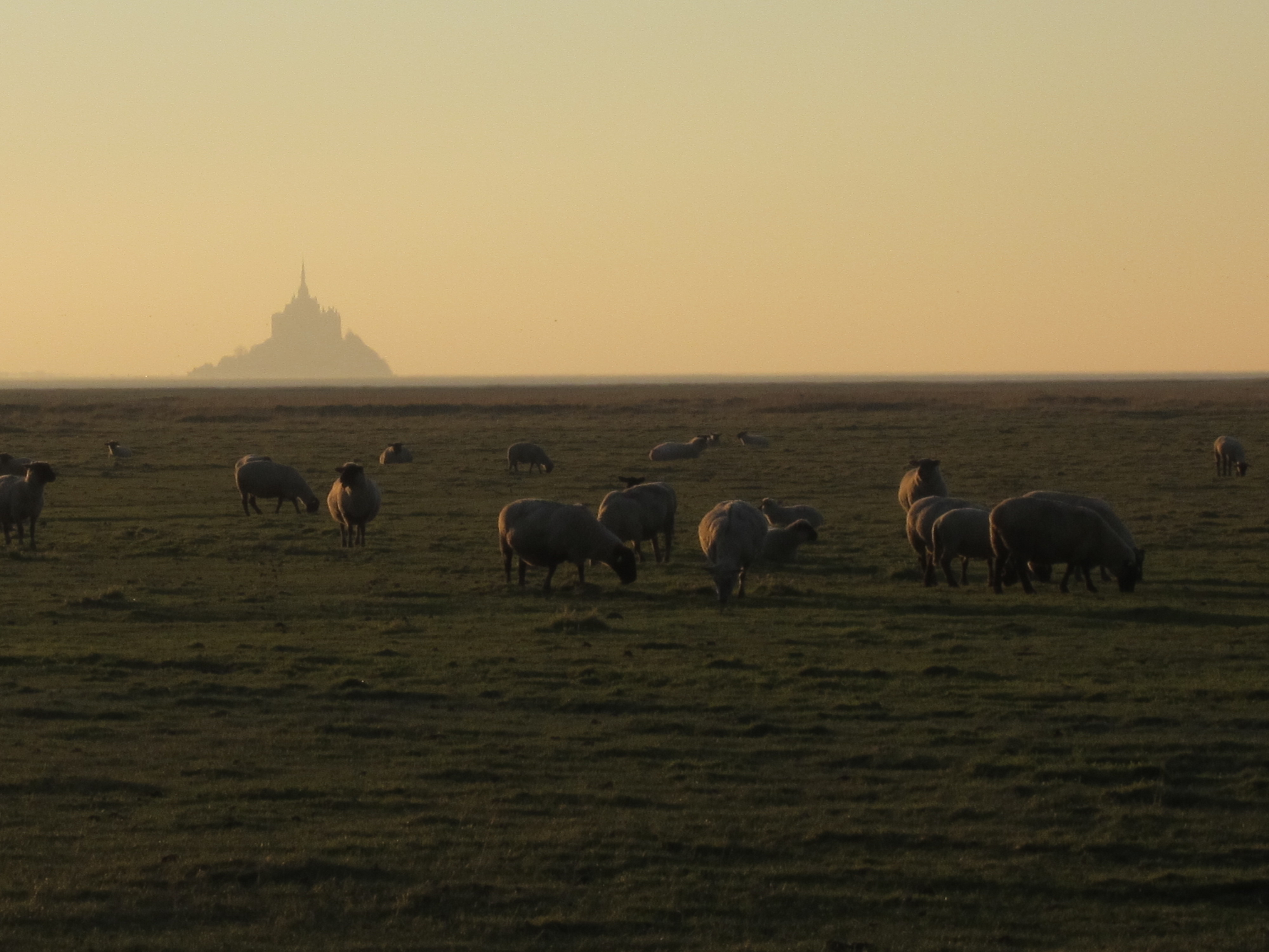 Le Val-Saint-Père, Manche